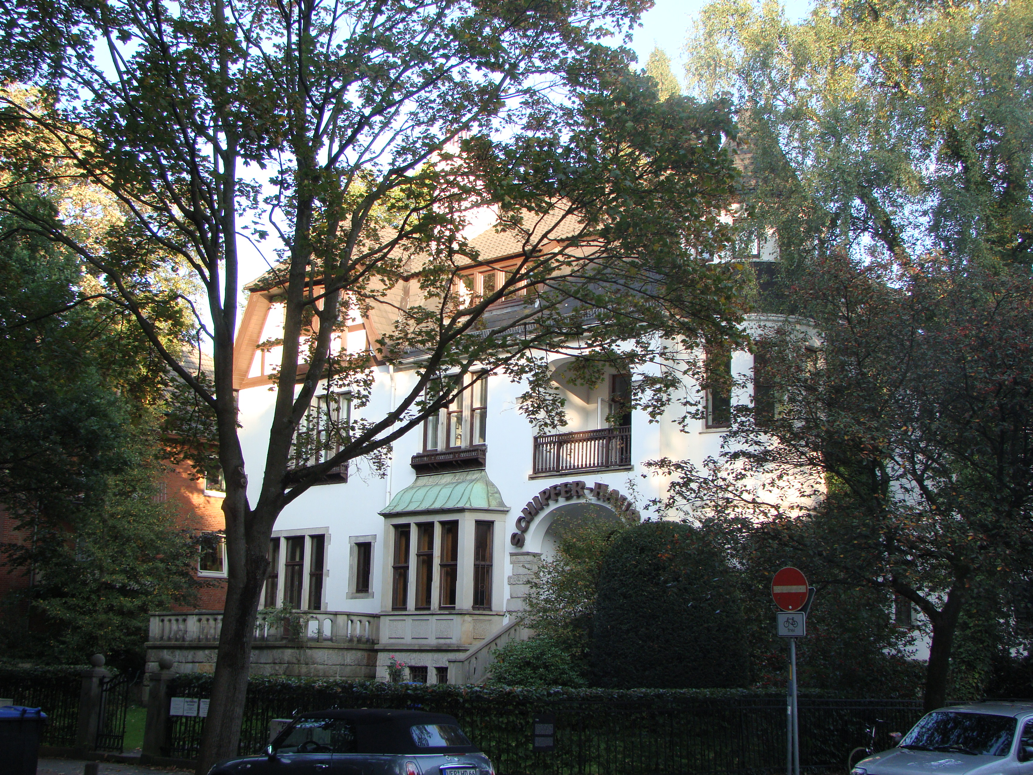 Villa Ahlers in Bremen, Parkallee 117.Das abgebildete Objekt ist ein geschütztes Kulturdenkmal in der Freien Hansestadt Bremen, mit der Nr. 1002 beim Landesamt für Denkmalpflege registriert.